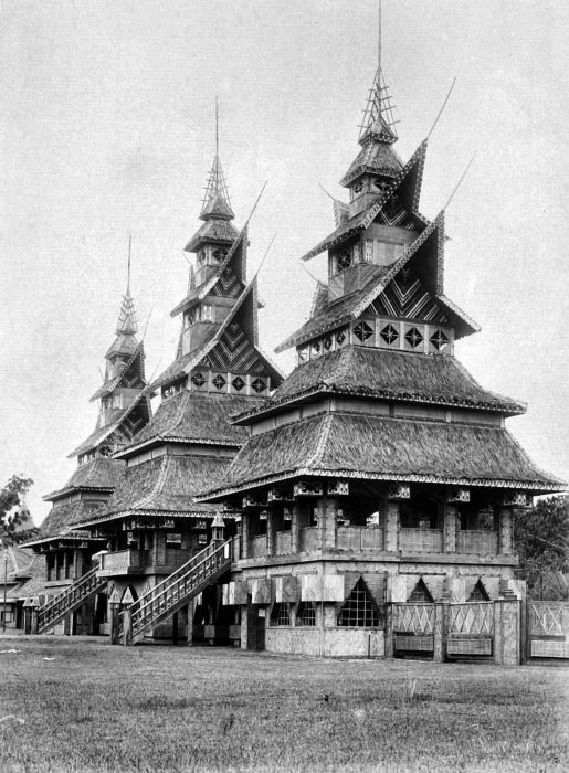 Repronegatief. De jaarmarkt 'Pasar Gambir' van 1928 te Jakarta, Java